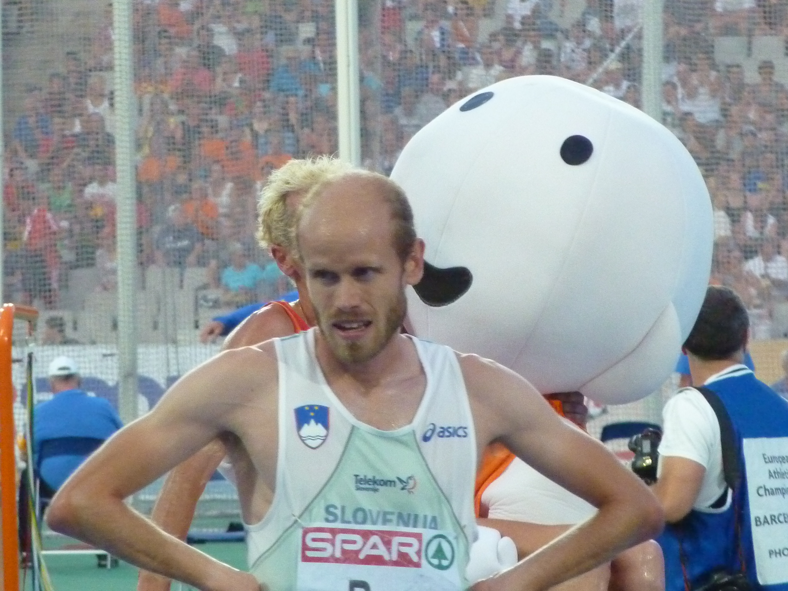 Bostjan Buc